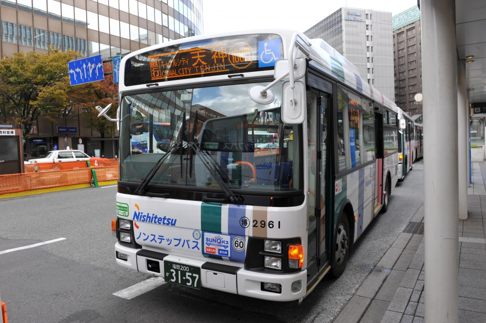 西鉄バス100円ライナー